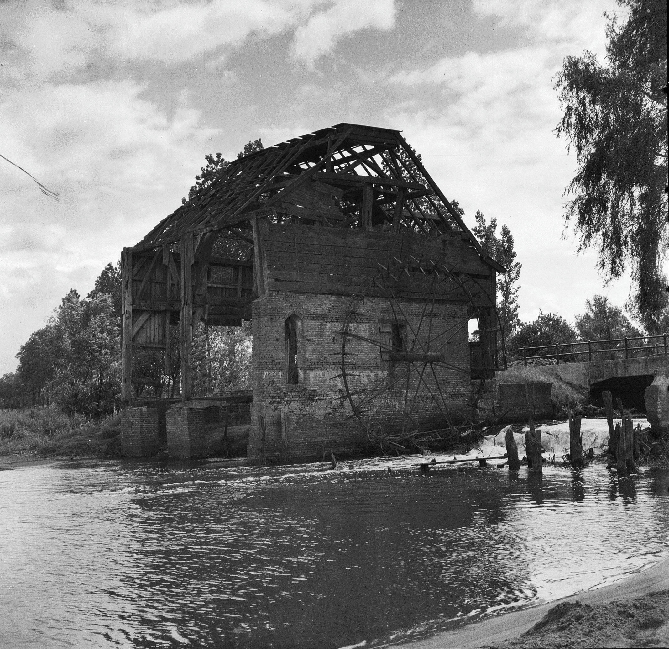 Waterradmolen in verval, exterieur